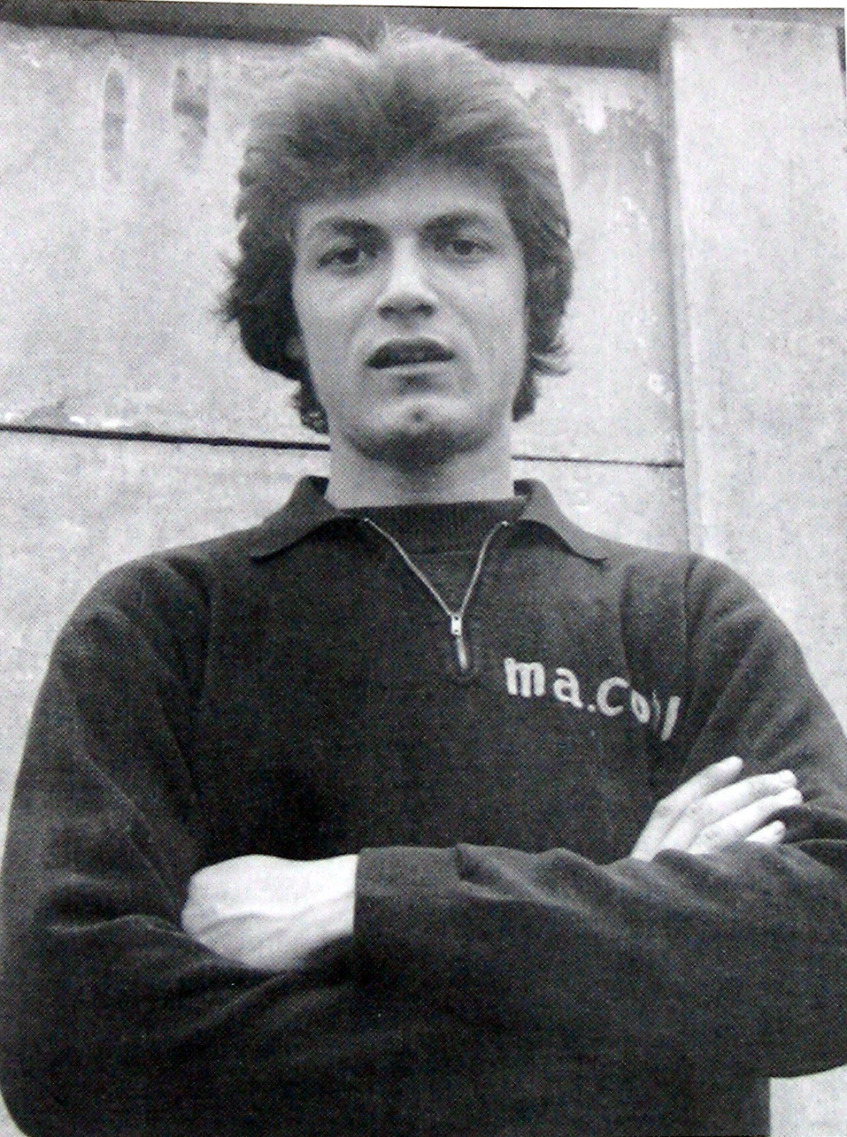 Giancarlo Antognoni con la tuta dell'Astimacobi, foto del 1972. Categoria:Immagini di Giancarlo Antognoni